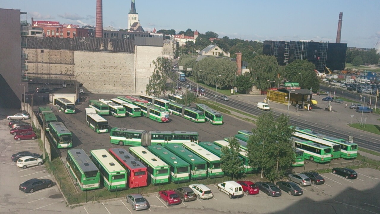 Tallinna linnaliinibusside parkla Ahtri tänaval